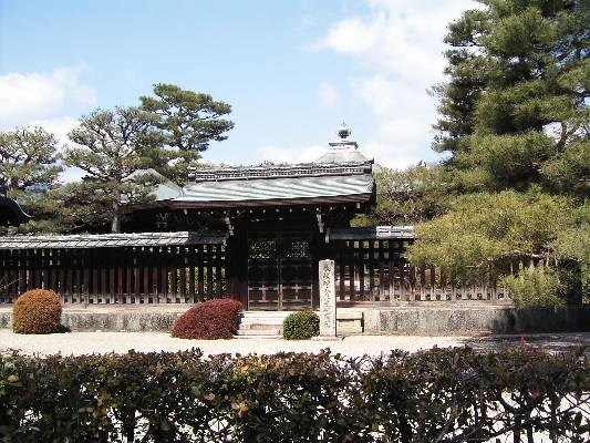 Emperor Go-Saga(後嵯峨天皇)'s Imperial mausoleum (misasagi) at Kyoto, copied from Wikipedia この写真は2004年(平成16年)3月26日に投稿者が撮影したものです。